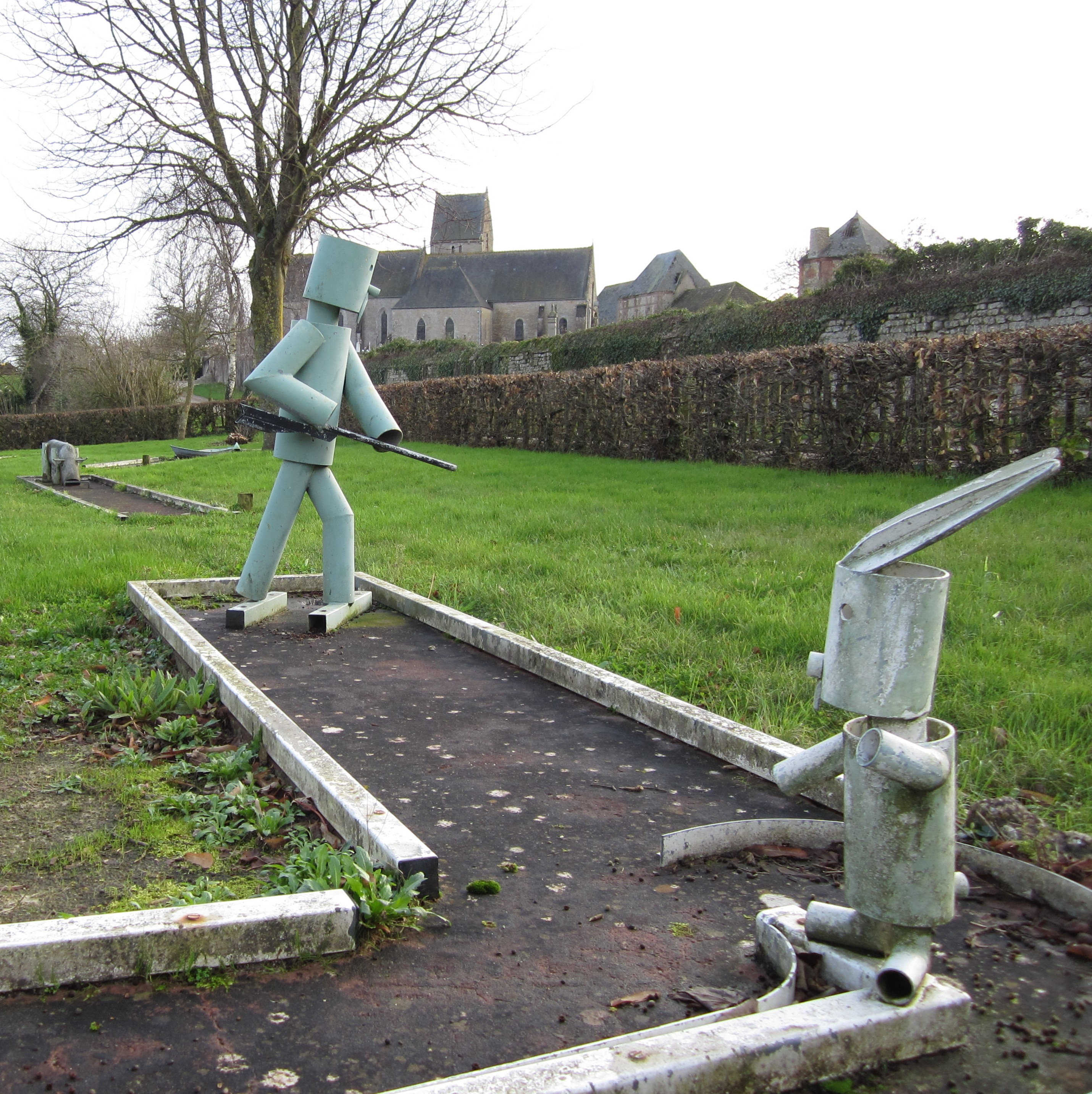 Ravenoville